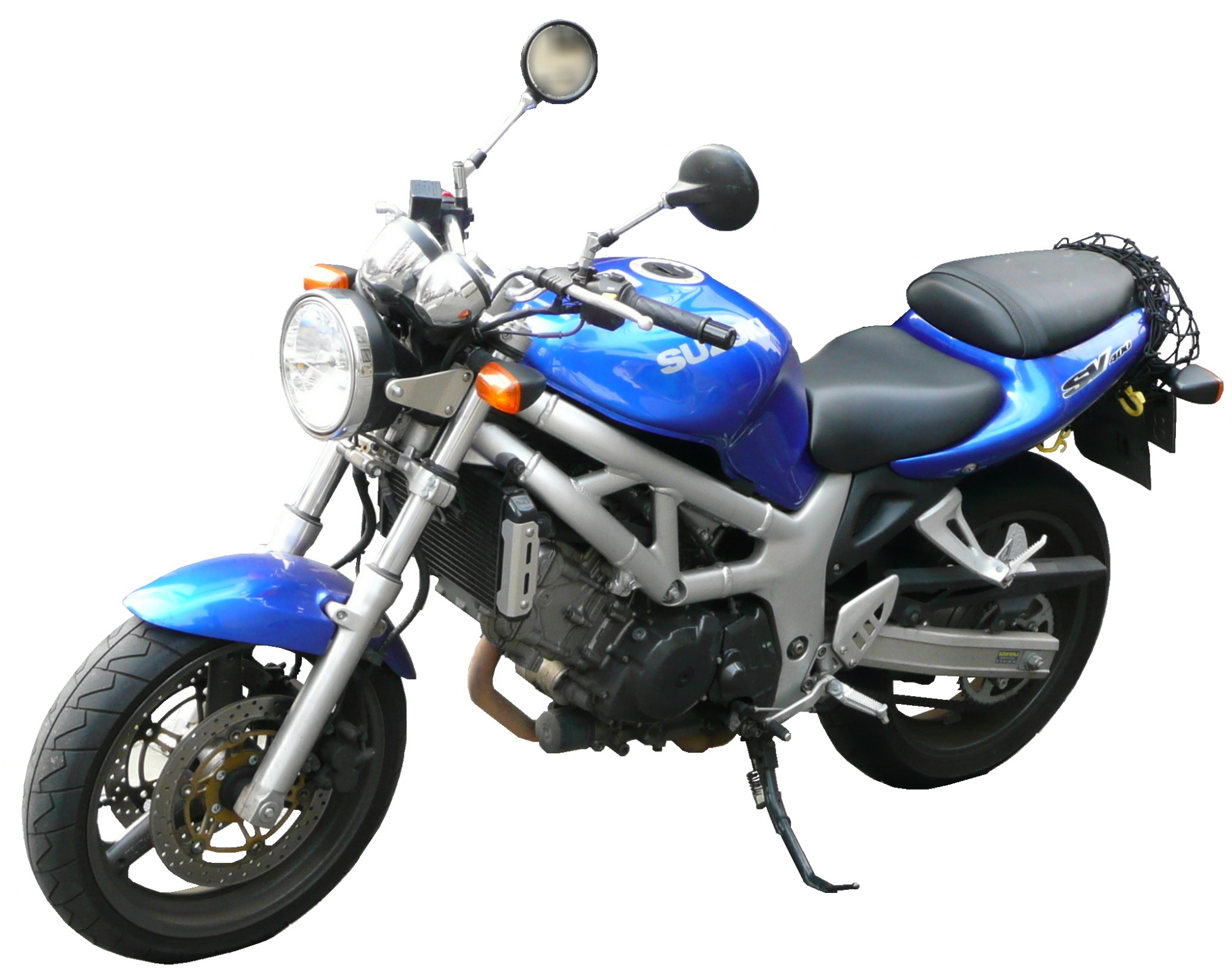 suzuki SV400